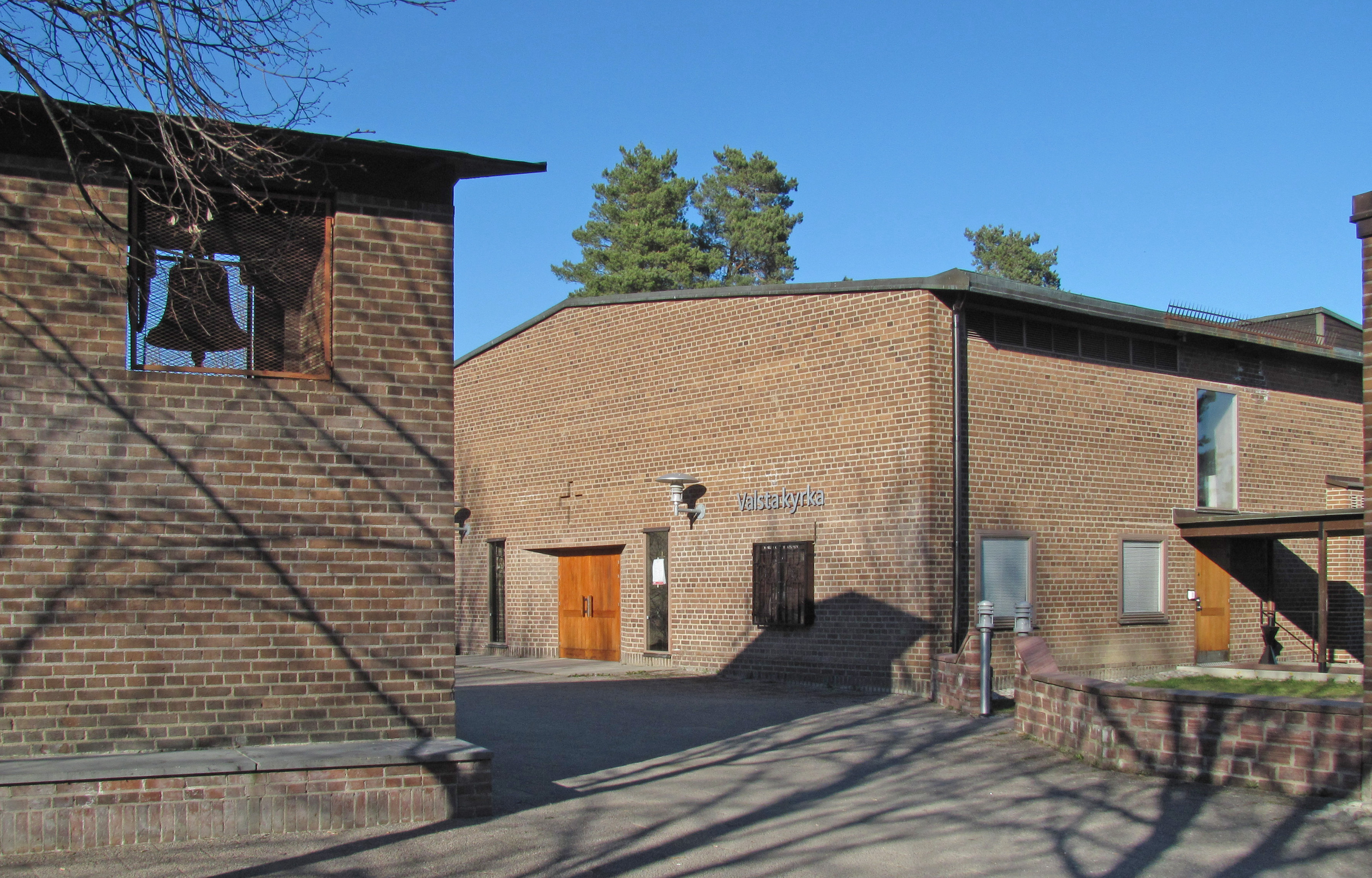 Valsta kyrka